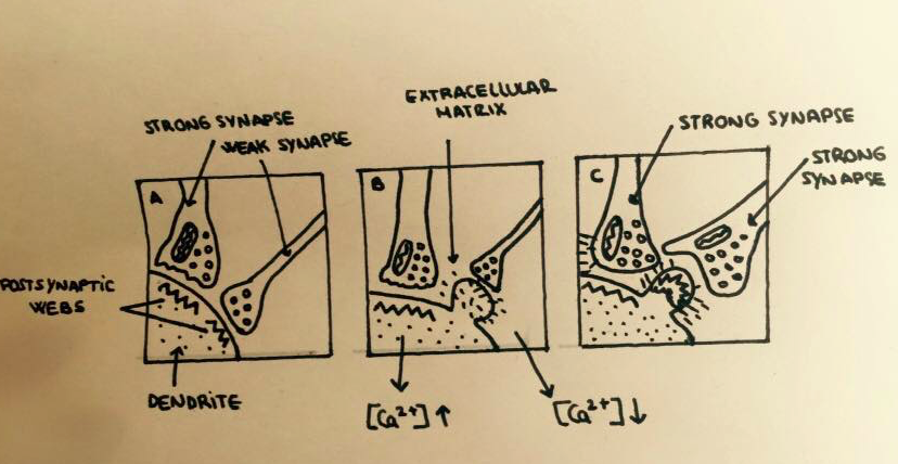 En aquest dibuix, podem observar un esquema del procés de polimerització de l'ependimina, en el qual a partir d'una sinapsi dèbil i una forta, es provoquen dues de fortes.